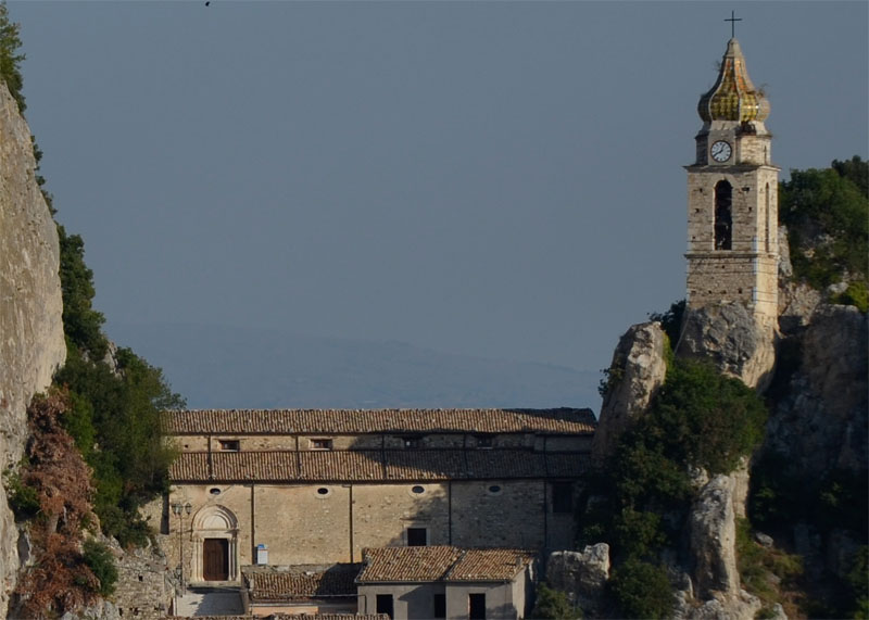 Vista panoranica della chiesa di San Silvestro, Bagnoli del Trigno